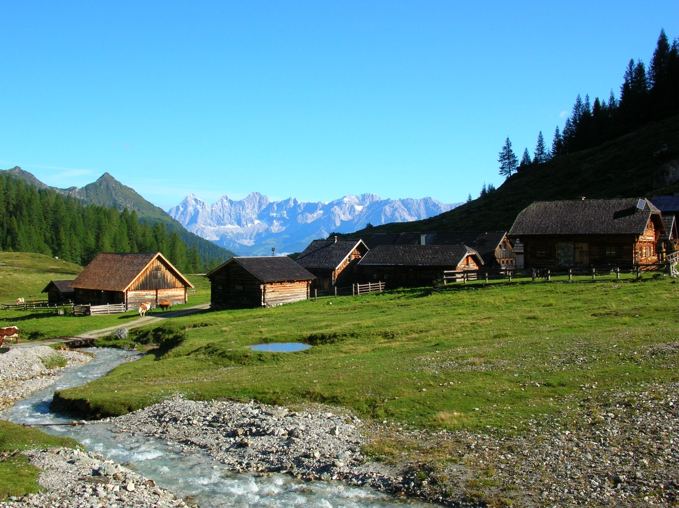 A view to Dachstein from Ursprung Alm